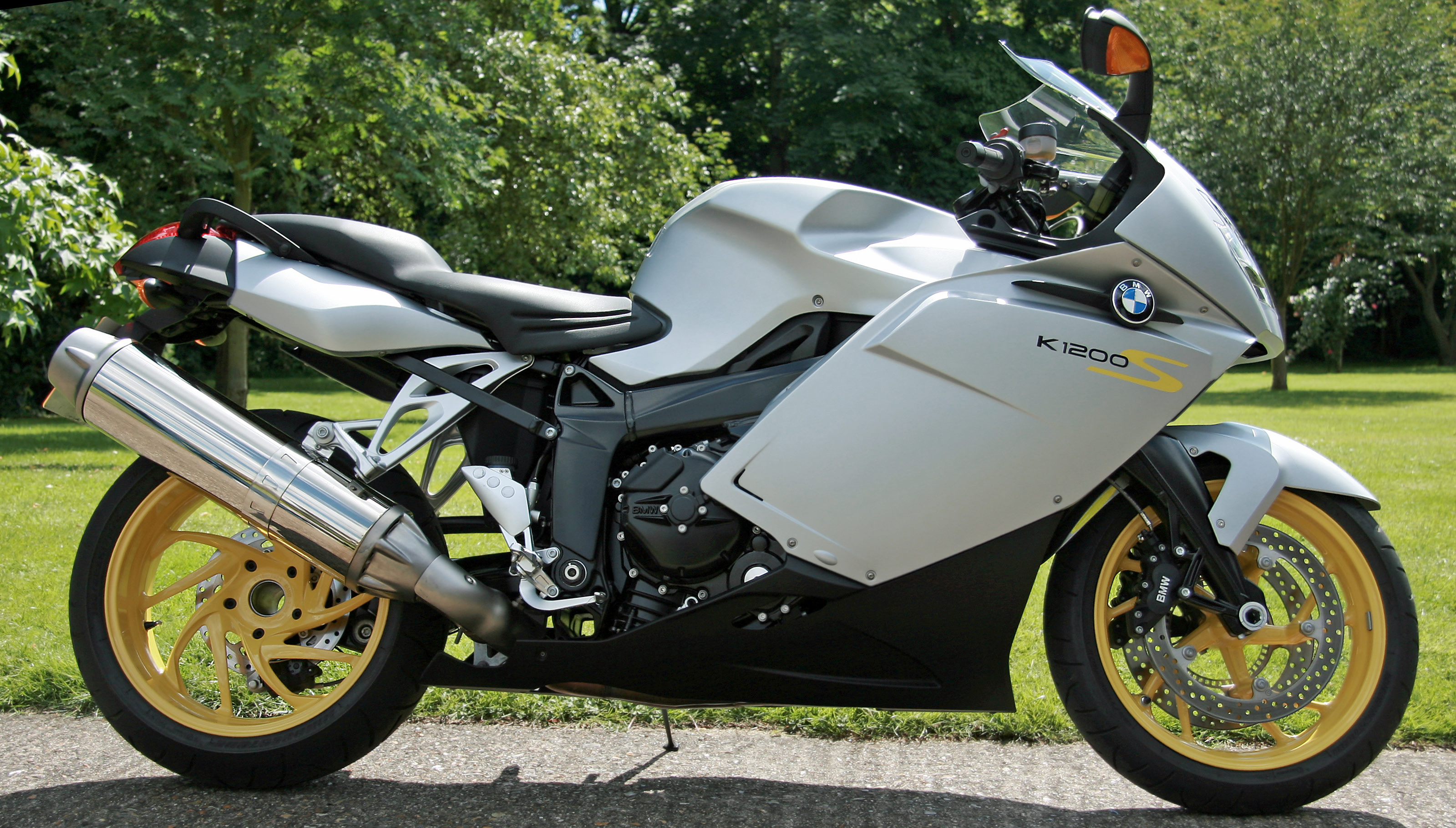 BMW K1200S motorcycle